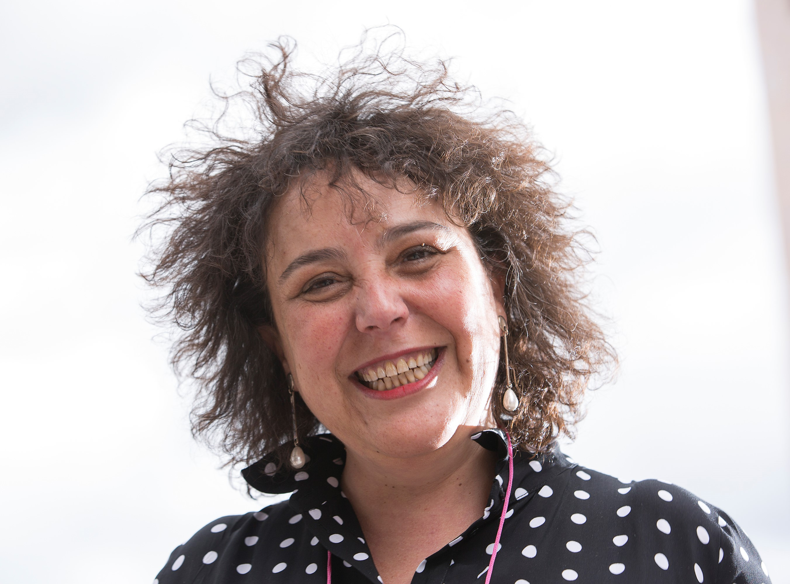 La poeta Emma Cabal en Oviedo (6 de mayo de 2017), fotografiada por Asís G. Ayerbe